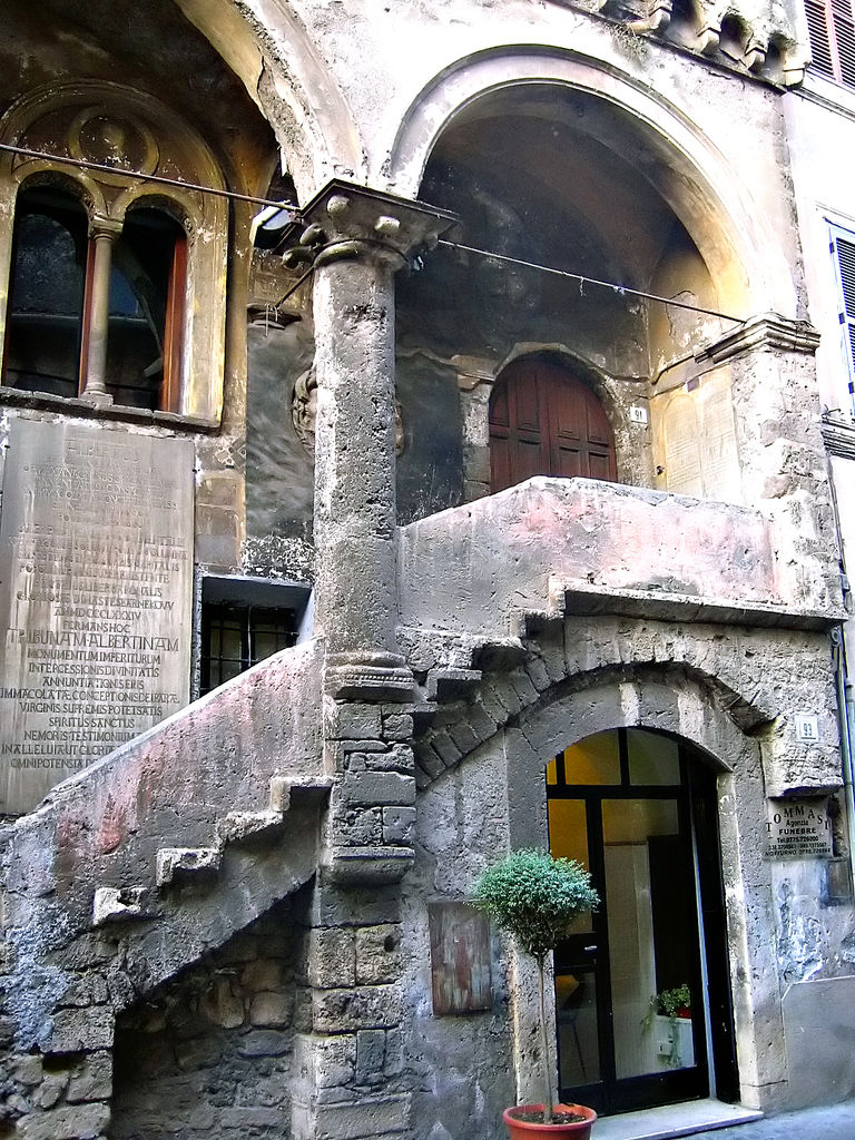 Anagni, Lazio, Italia